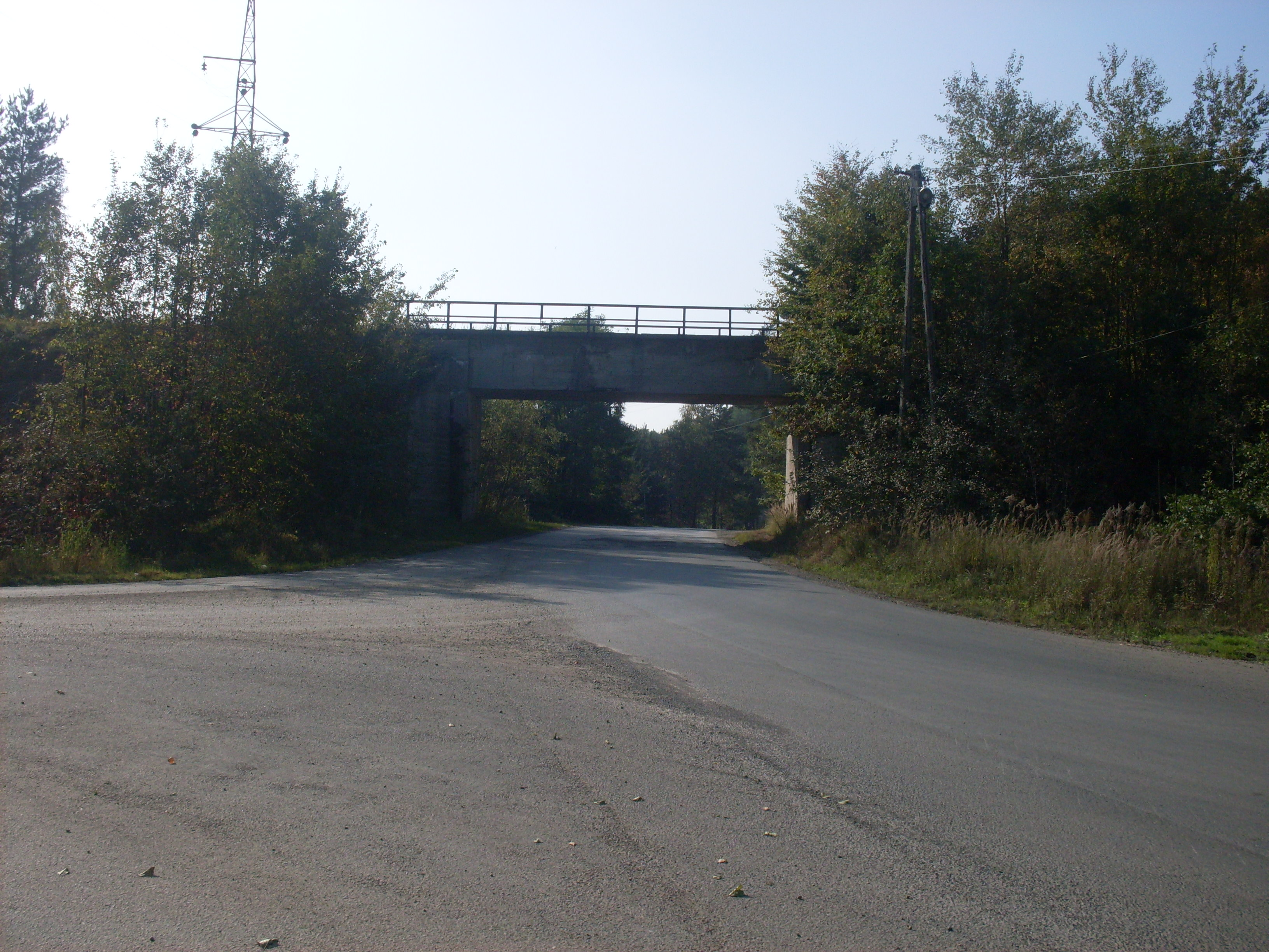 Wiadukt kolejowy Zalas (Tataruchy)